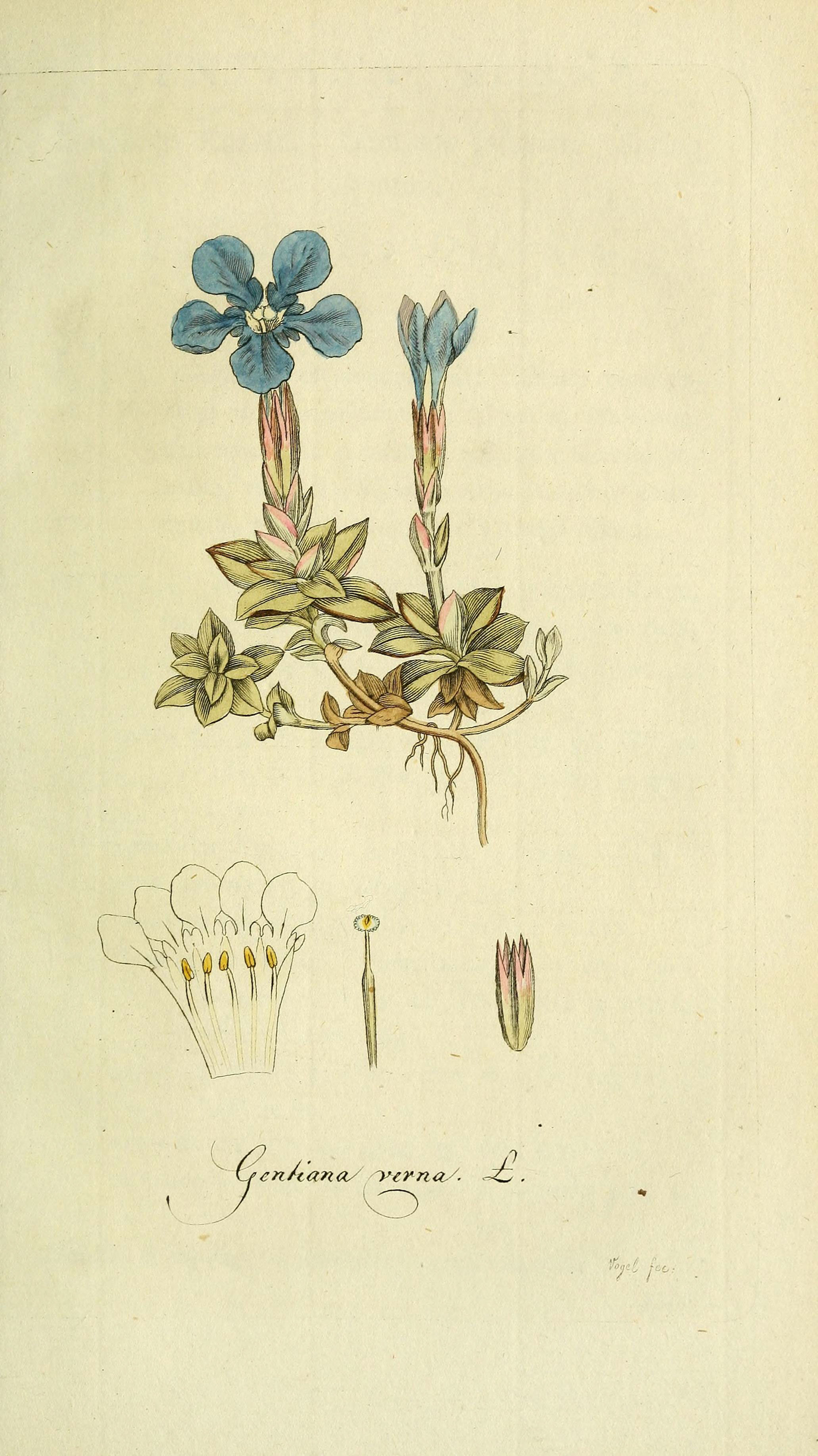 cn/iana/ ~rtr-na,s. ^ZZ